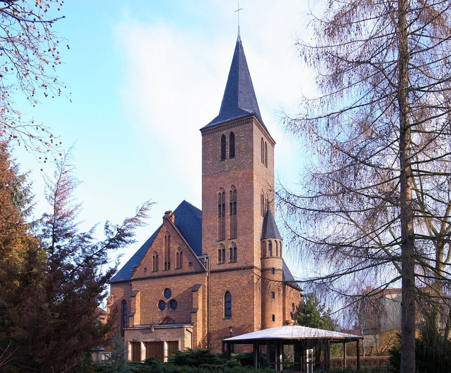 Sandersdorf, Kath. Kirche St. Marien